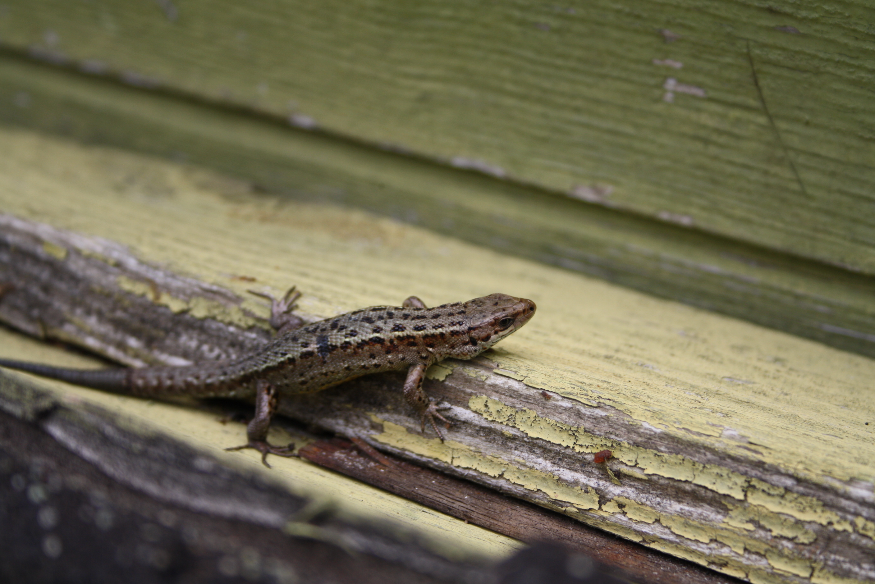 Arusisalik. Pildistatud üles Harjumaal, Kose vallas. Peesitas päikese käes koduaias mesitaru peal.